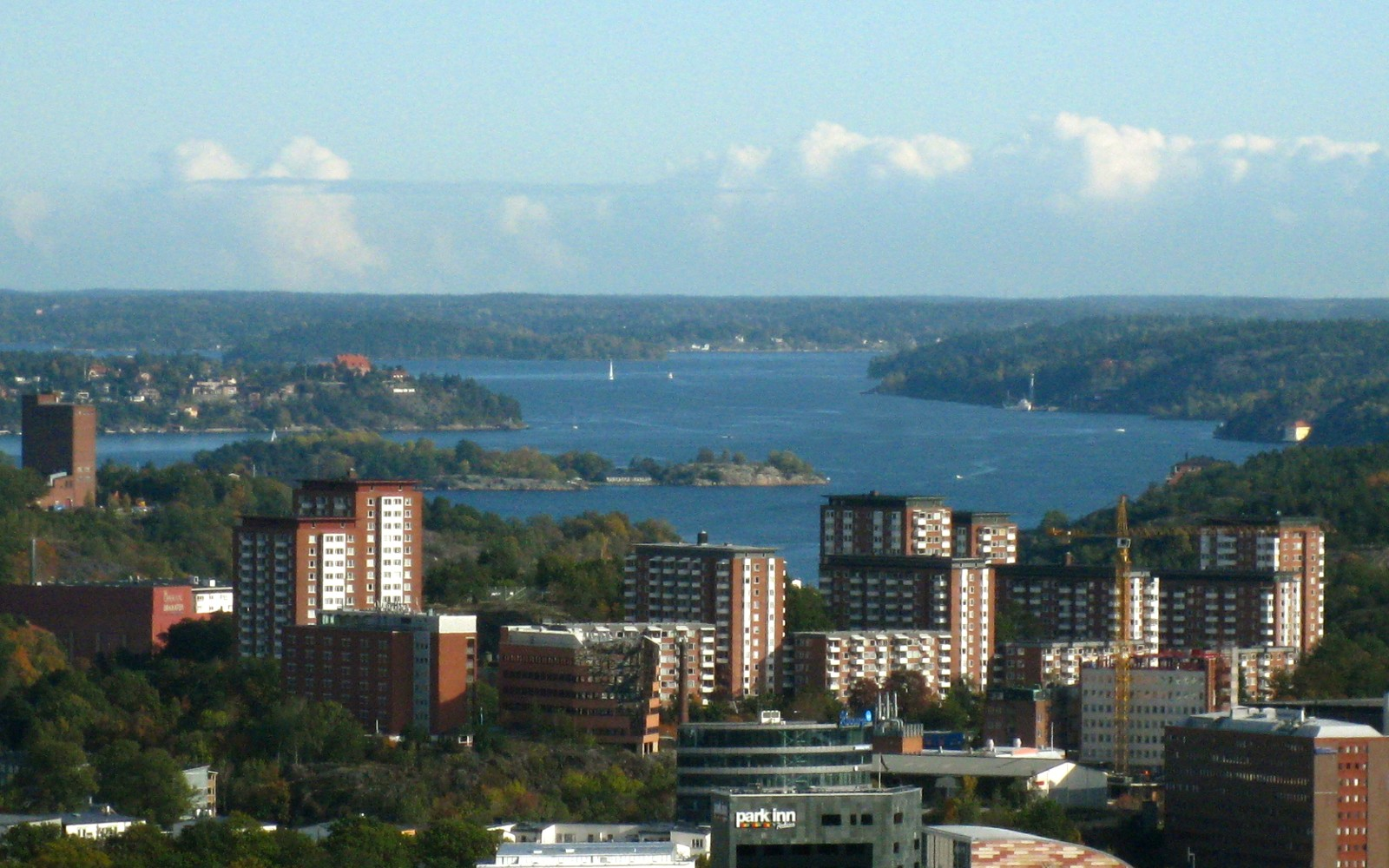 Halvkakssundet sett från Globen. I förgrunden syns Alphyddan och Fjäderholmarna. Till vänster syns Kvarnen Tre Kronor och Högberga gård.